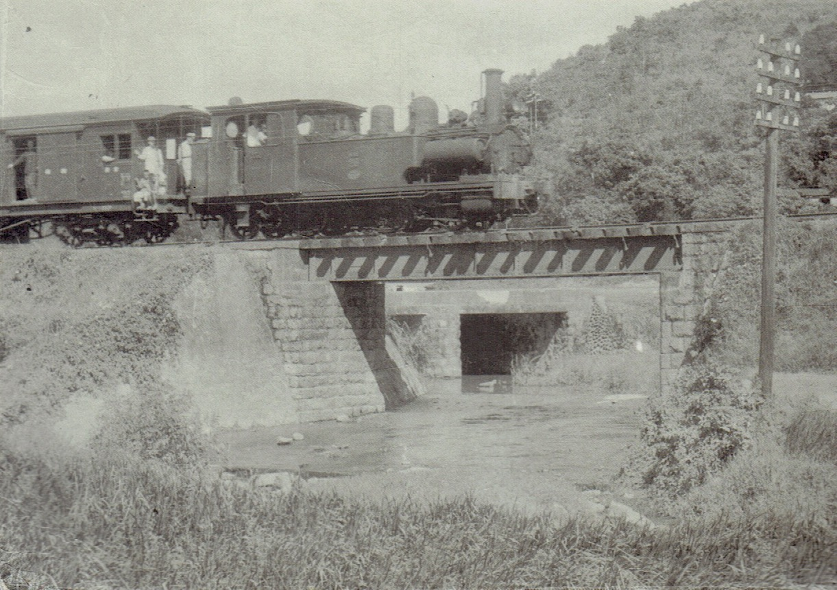 台北鐵道株式會社 萬華—新店線列車。